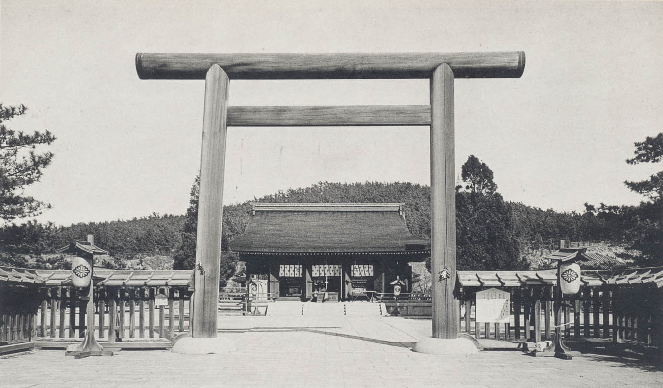 青岛神社第二鸟居及拜殿